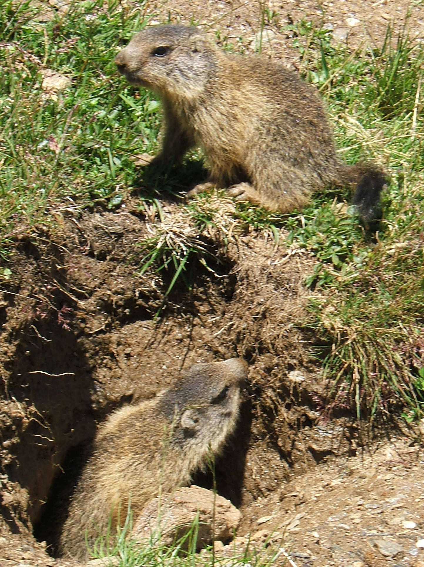 Junge Murmeltiere in Südtirol, bei der Labeseben Alm